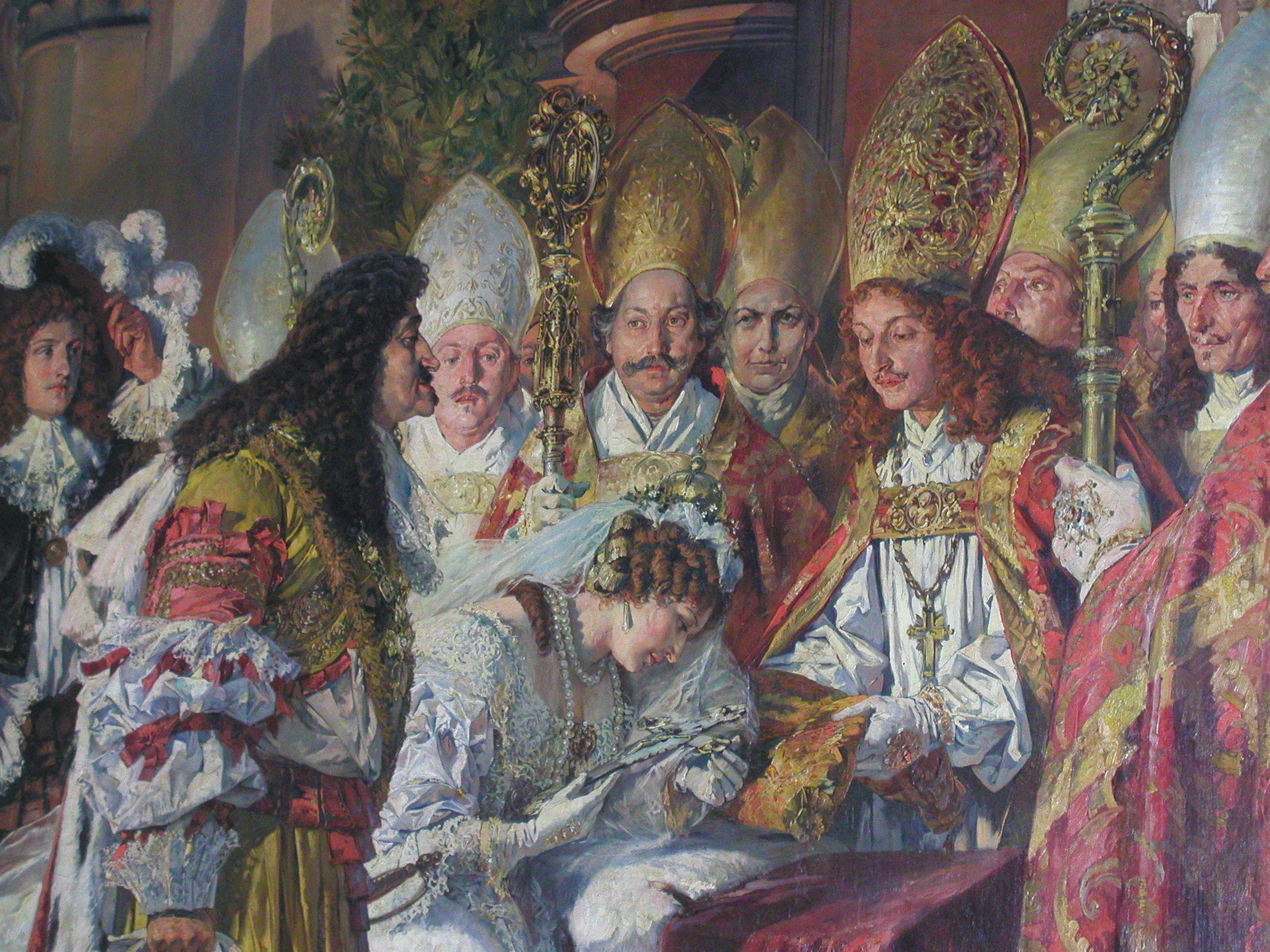 Selbst aufgenommenes Bild aus dem Großen Rathaussaal in Passau